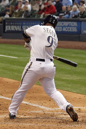 Jean Segura